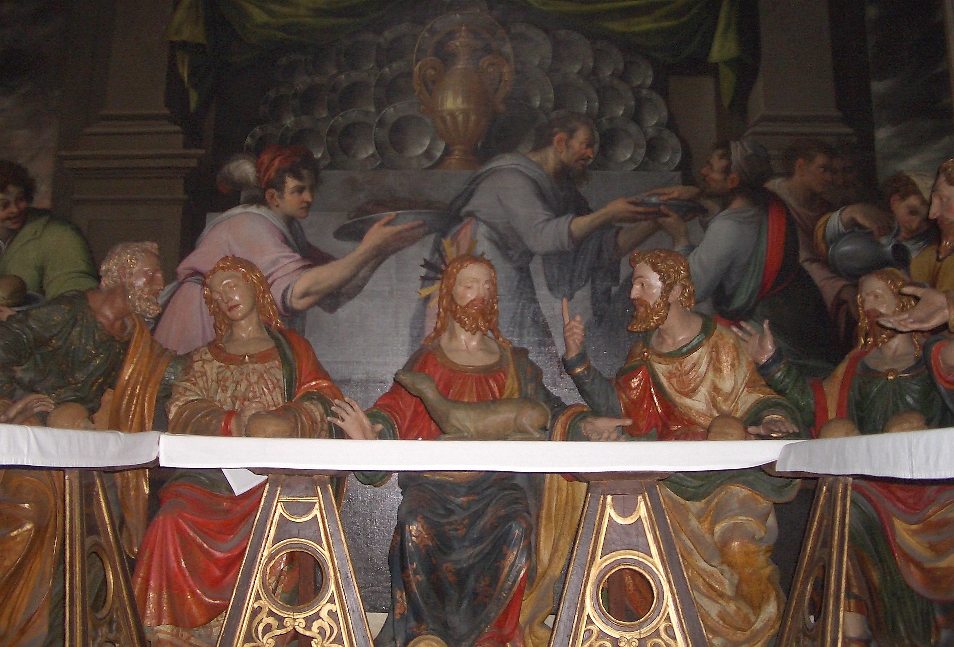 Andrea da Saronno, The Last Supper (detail), Santuario della Beata Vergine dei Miracoli, Saronno (Varese), Italy